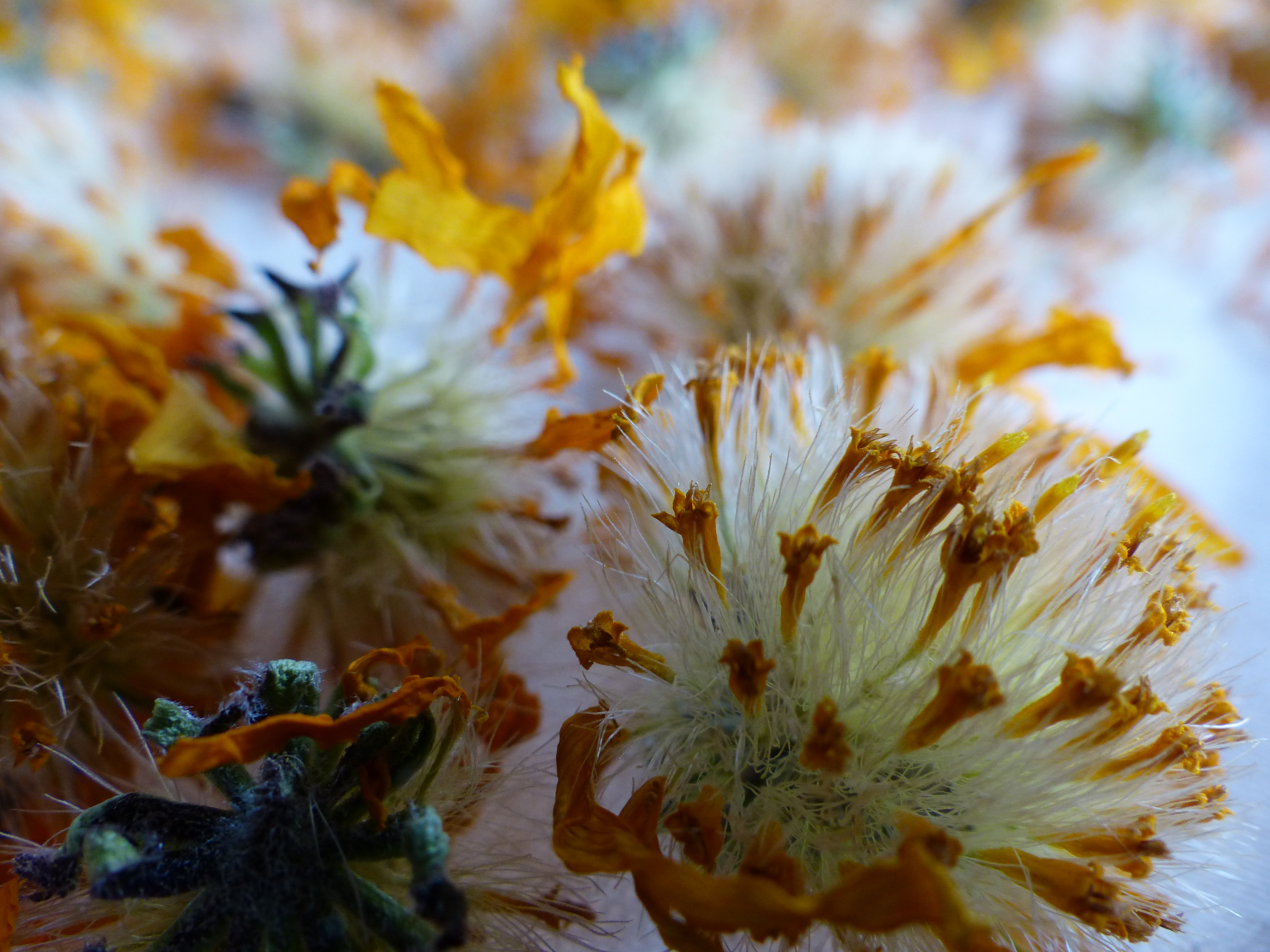 Naturhof, Arnikablüten getrocknet